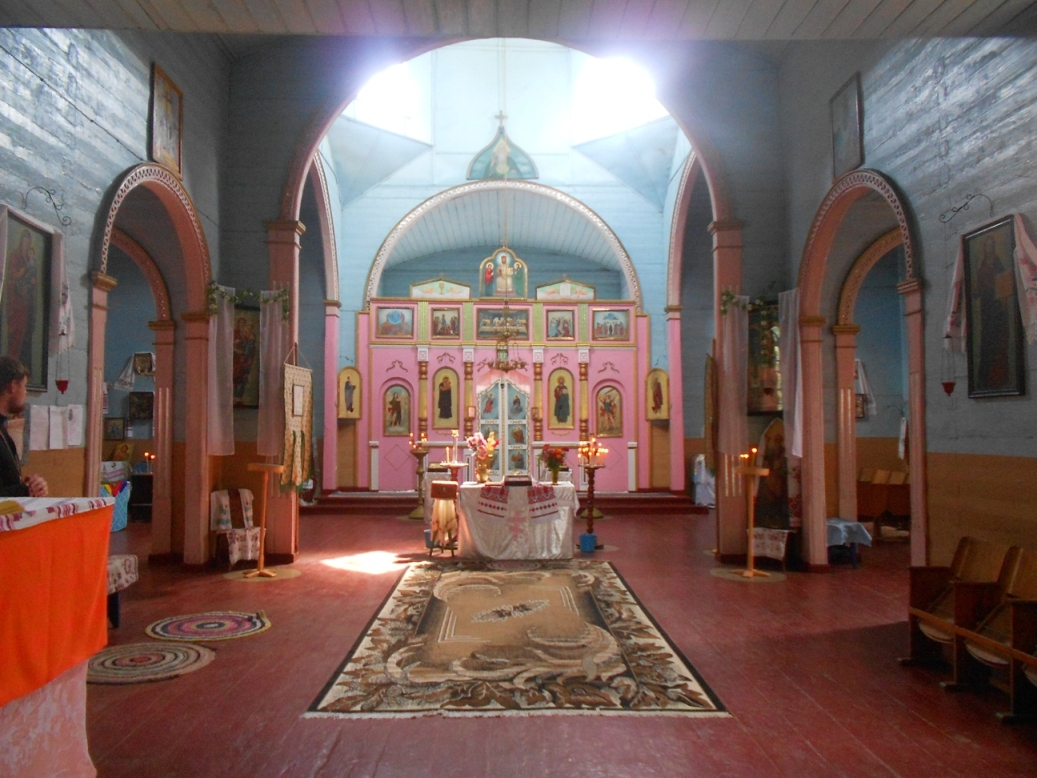 Внутрішній вигляд церкви